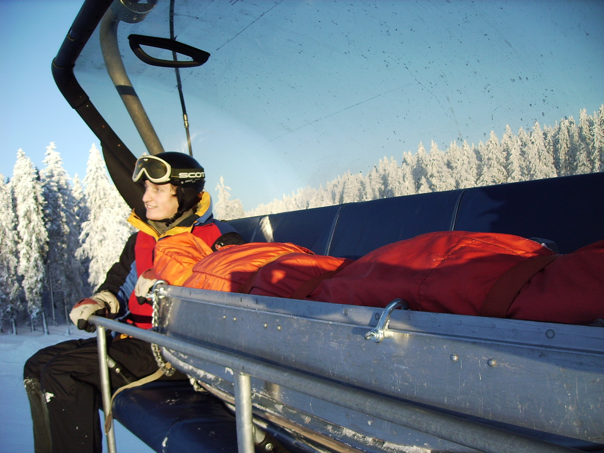 Akia im Sessellift (Feldberg-Seebuck, Schwarzwald) Mountain sledge (Akia) in chair lift (Feldberg-Seebuck, Schwarzwald)